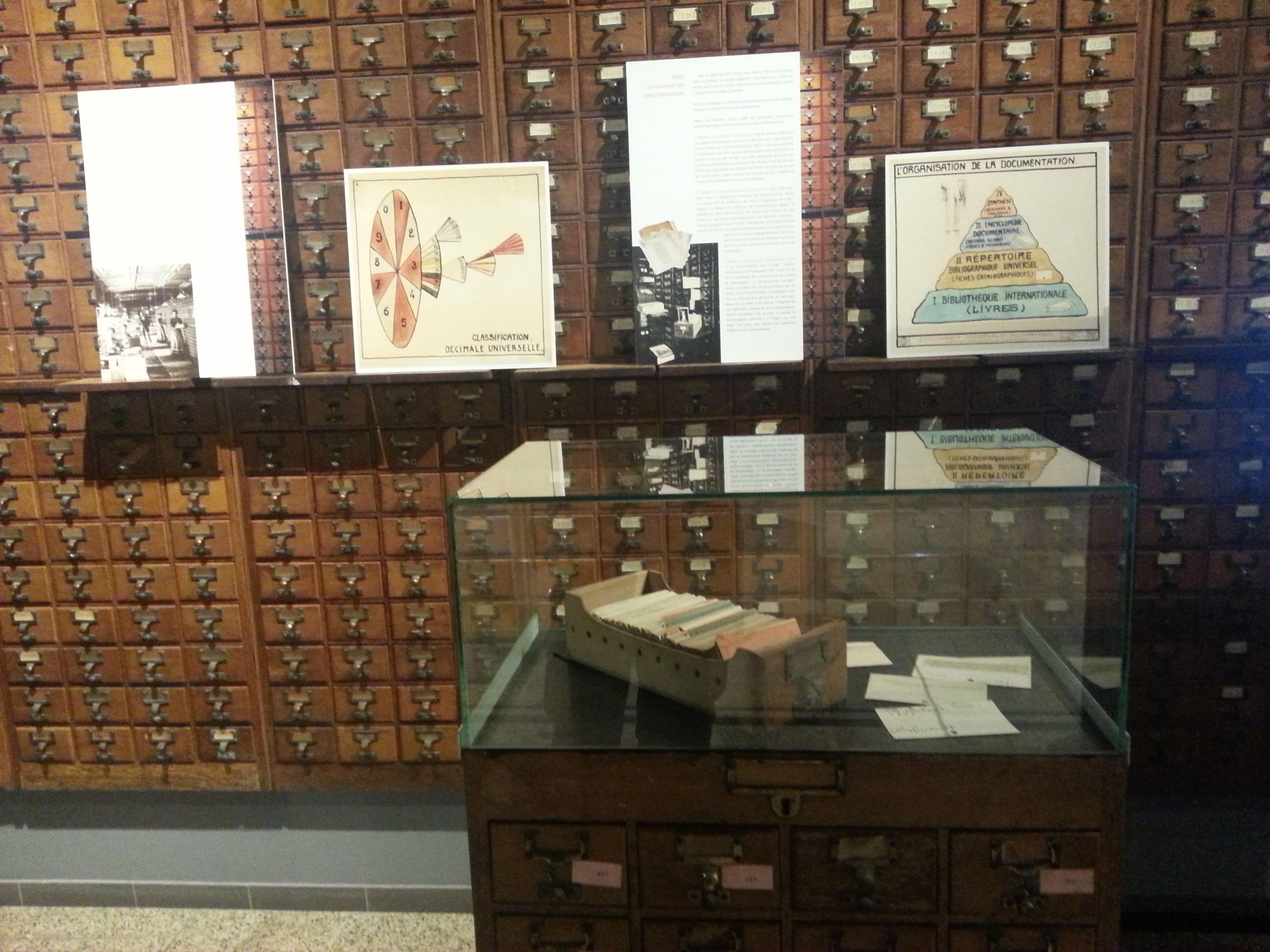 Anschauungsmodell der Universelle Dezimalklassifikation aus dem Mundaneum